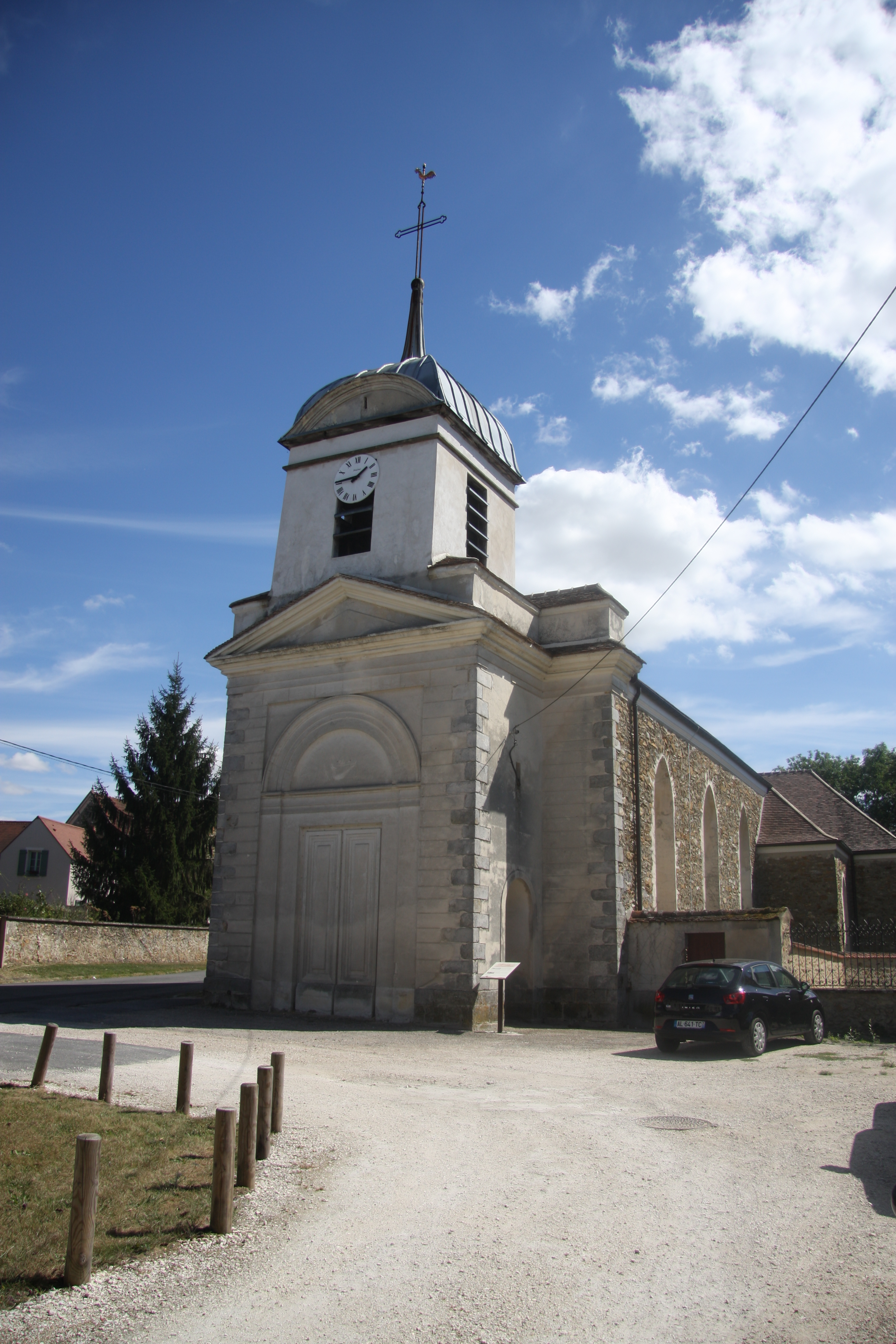 Église Saint-Pierre de Mauperthuis